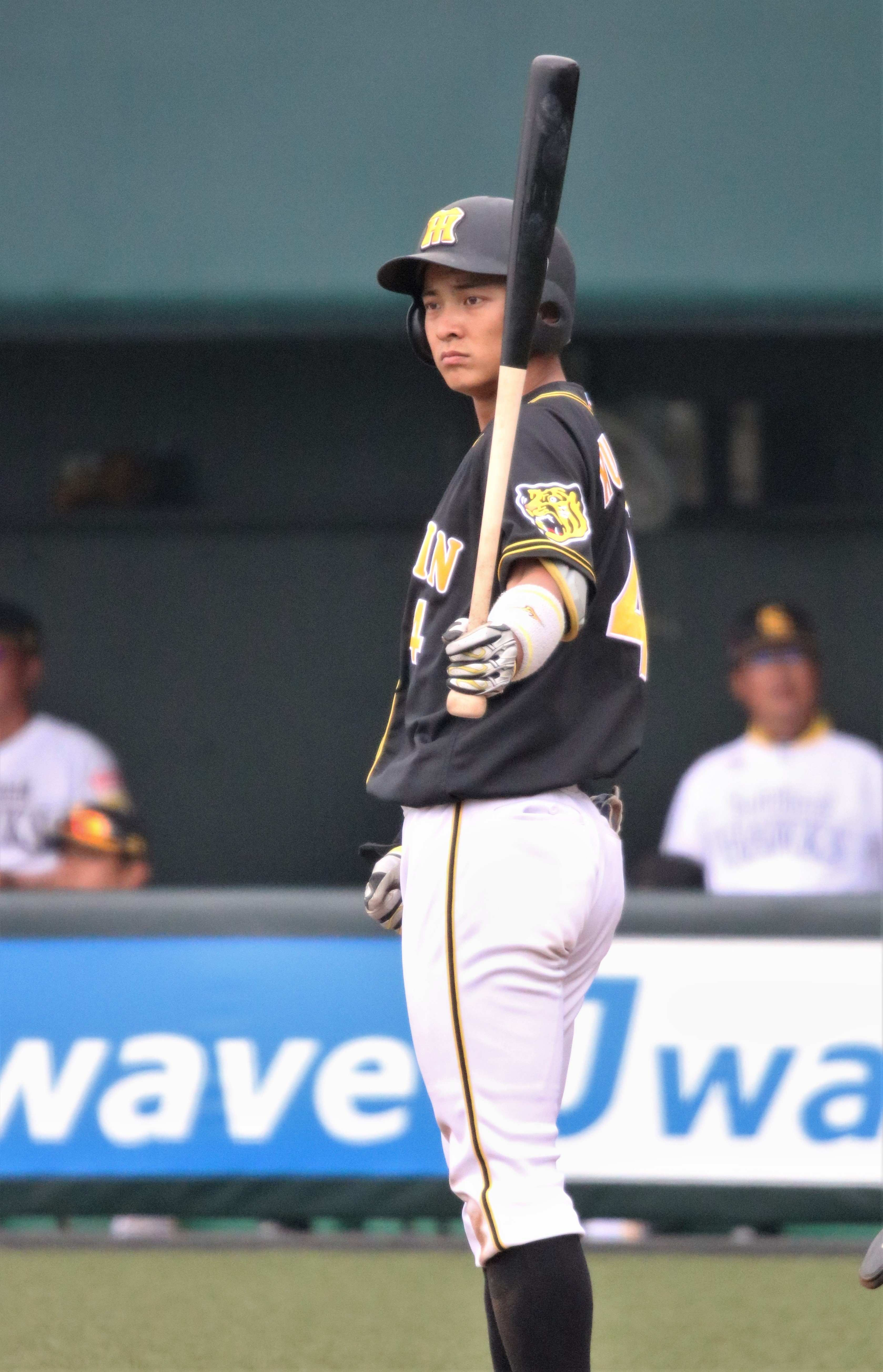 2018/5/1 タマホームスタジアム筑後